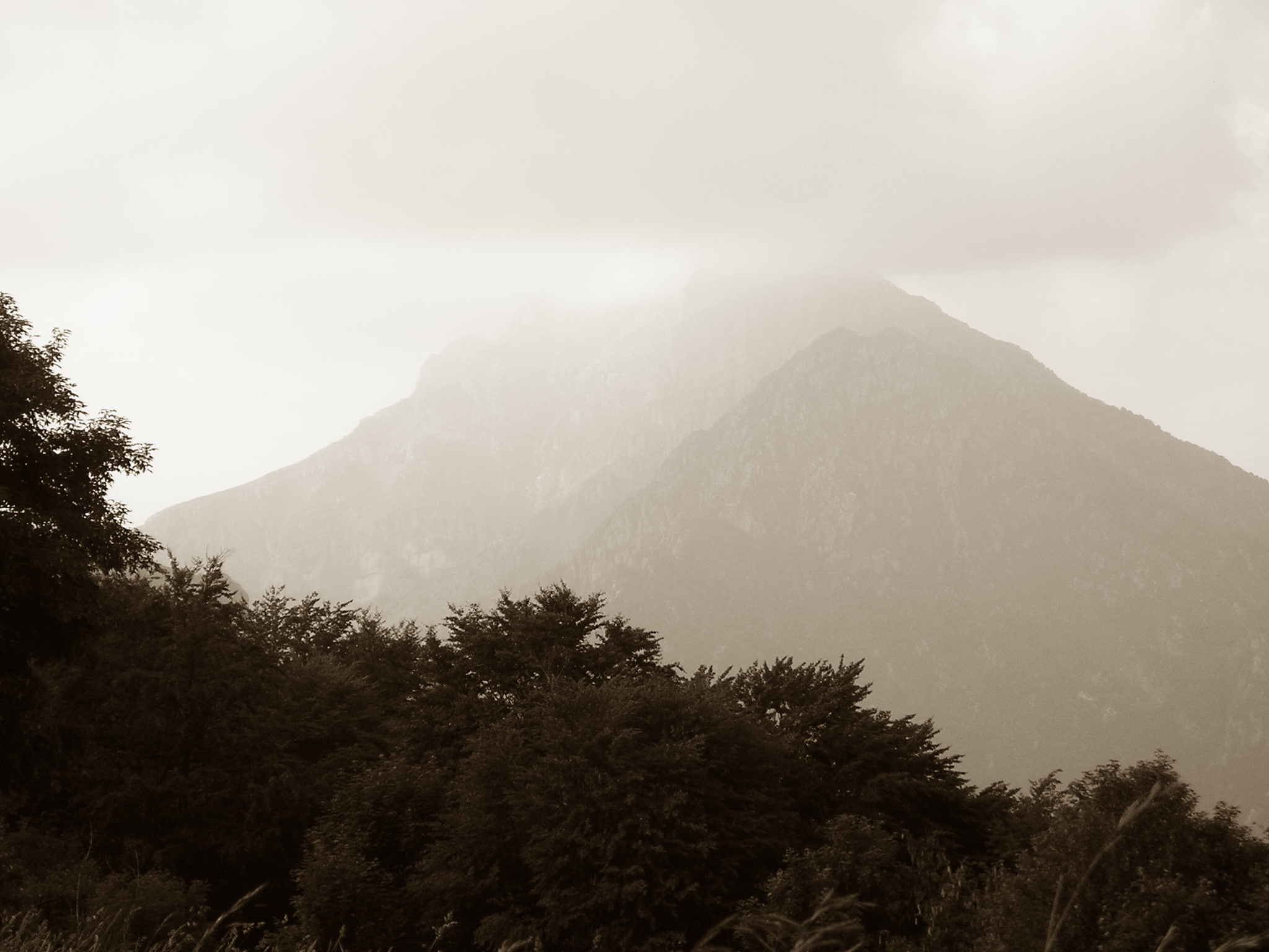 Foto del Monte Resegone incapucciato dalle nubi ripresa da Forcella (frazione di Costa Valle Imagna, autore Massimo Macconi)